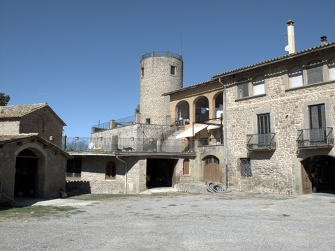 Castell de Quer a la comarca d'Osona - Catalunya